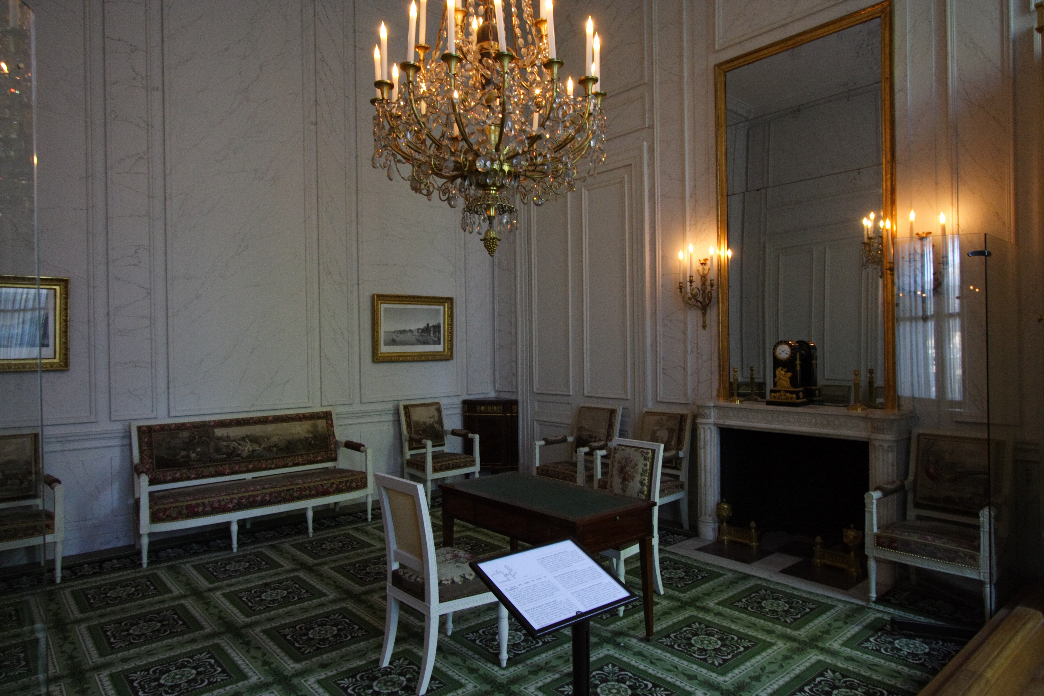 Salon der Adjutanten des Kaisers im Schloss Fontainebleau